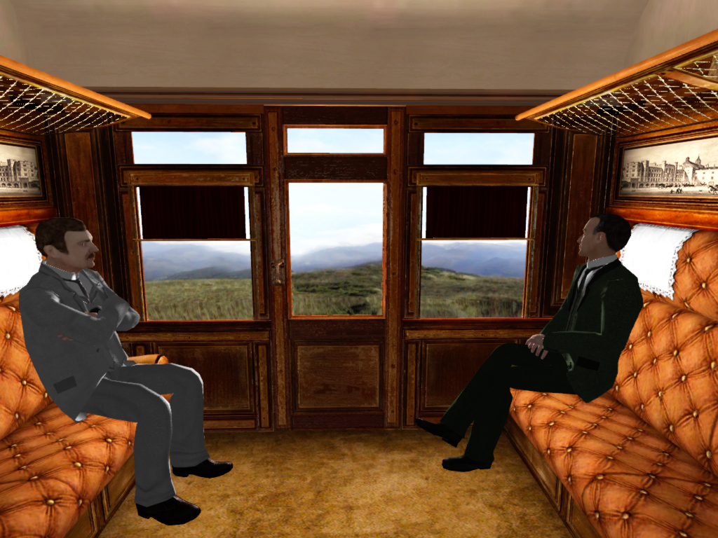 Capture d'écran du jeu Sherlock Holmes : la Nuit des Sacrifiés. Capture prise dans le train qui ramène Holmes et Watson de Suisse. On y décèle un clin d'œil à certaines illustrations des aventures de Sherlock Holmes réalisées par Sidney Paget.